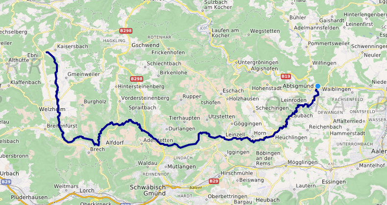 carte réalisée sur umap This map may be incomplete, and may contain errors. Don't rely solely on it for navigation.